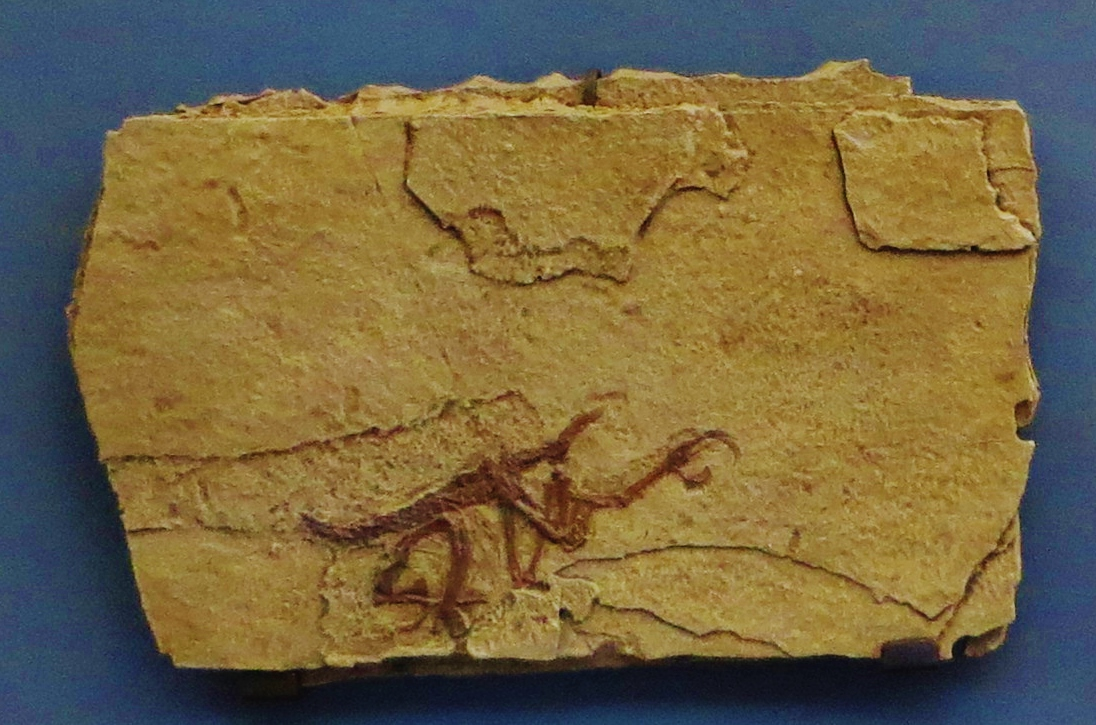 Fossil of Iberomesornis, an extinct bird- Took the photo at Musee d'Histoire Naturelle, Paris